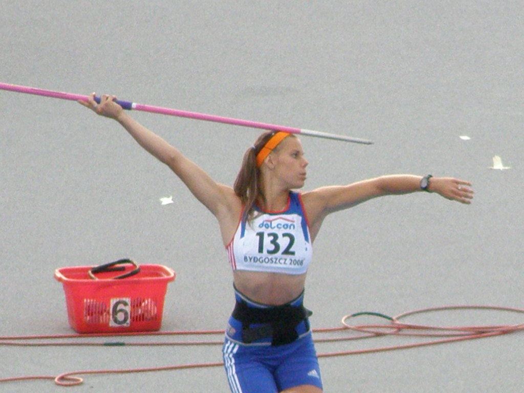 Mistrzostwa Świata Juniorów w Lekkoatletyce - Bydgoszcz 2008 - Nikola Ogrodníková - rzut oszczepem